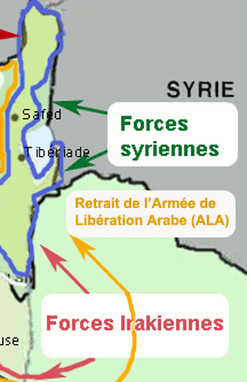 détail de la situation militaire sur le front du lac de Tibériade, vers le 1er juin 1948.